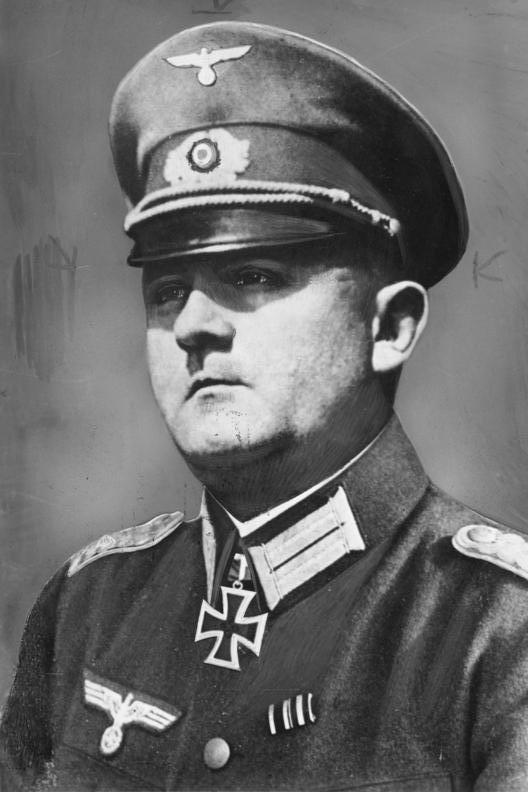 Factual corrections and alternative descriptions are encouraged separately from the original description. Additionally errors can be reported at this page to inform the Bundesarchiv. Original historic description: Dietrich v. Choltitz Porträt Dietrich von Choltitz in Uniform mit Ritterkreuz (verliehen am 18. Mai 1940). Ritterkreuz nachträglich montiert (Fotomontage / Retusche), Dienstgradabzeichen und Hoheitsadler auf der Dienstmütze retuschiert / nachträglich montiert. Aufnahme evt. vor 1933! Abgebildete Personen: Choltitz, Dietrich von: General der Infanterie, Ritterkreuz (RK), Heer, Deutschland (PND 118669281)